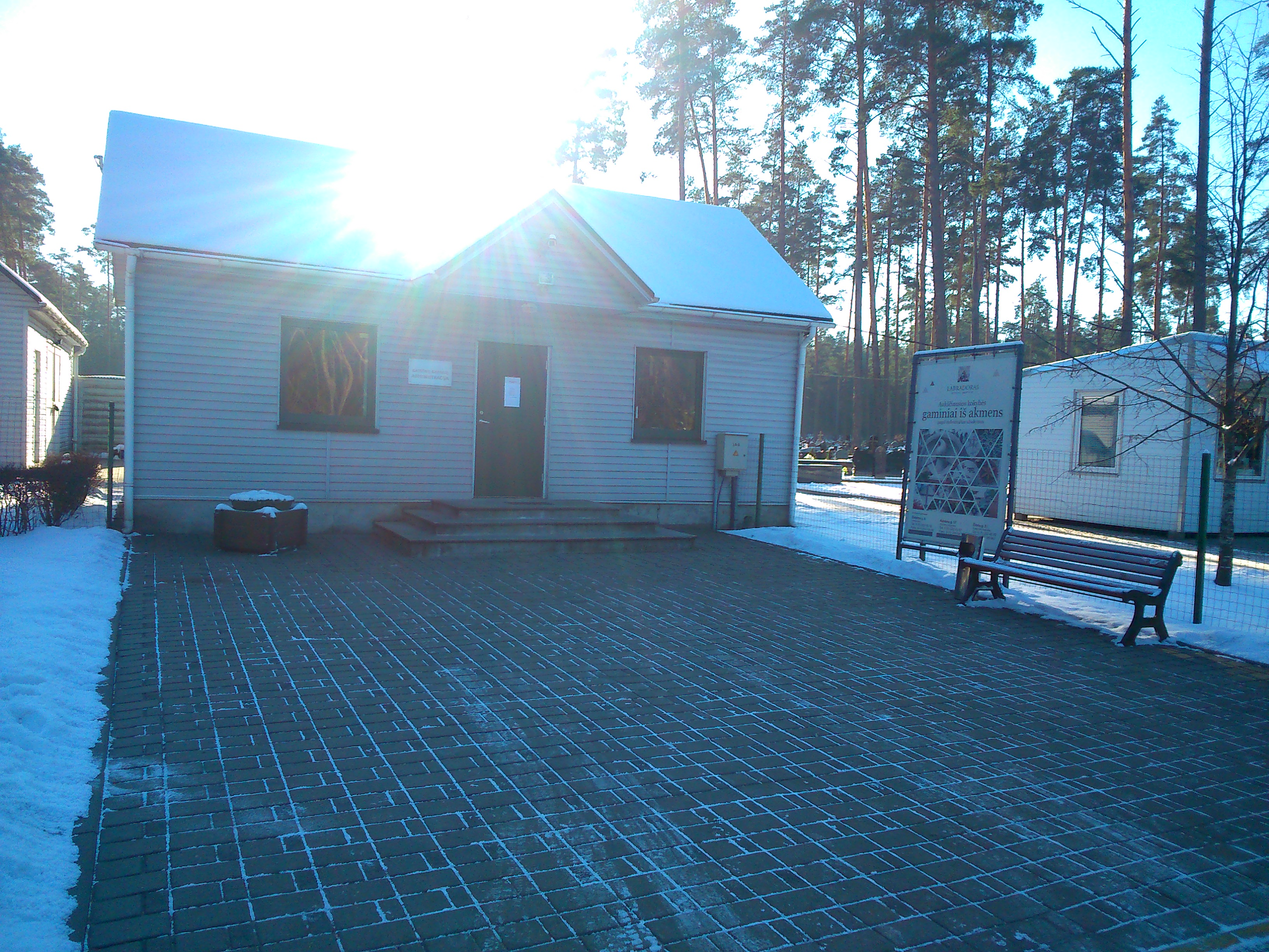 Kairėnų kapinės, administracija